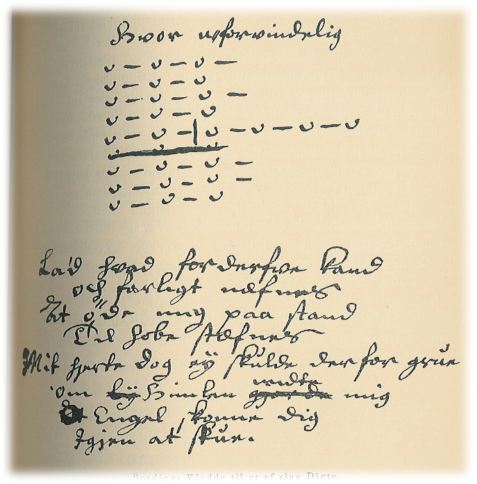 Anders Bordings kladde til et af sine digte.